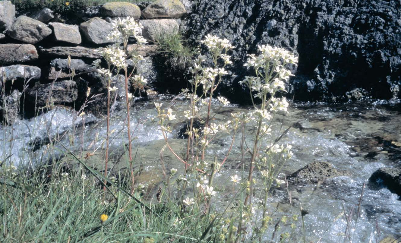 Saxifraga aquatica sous le col du Tourmalet